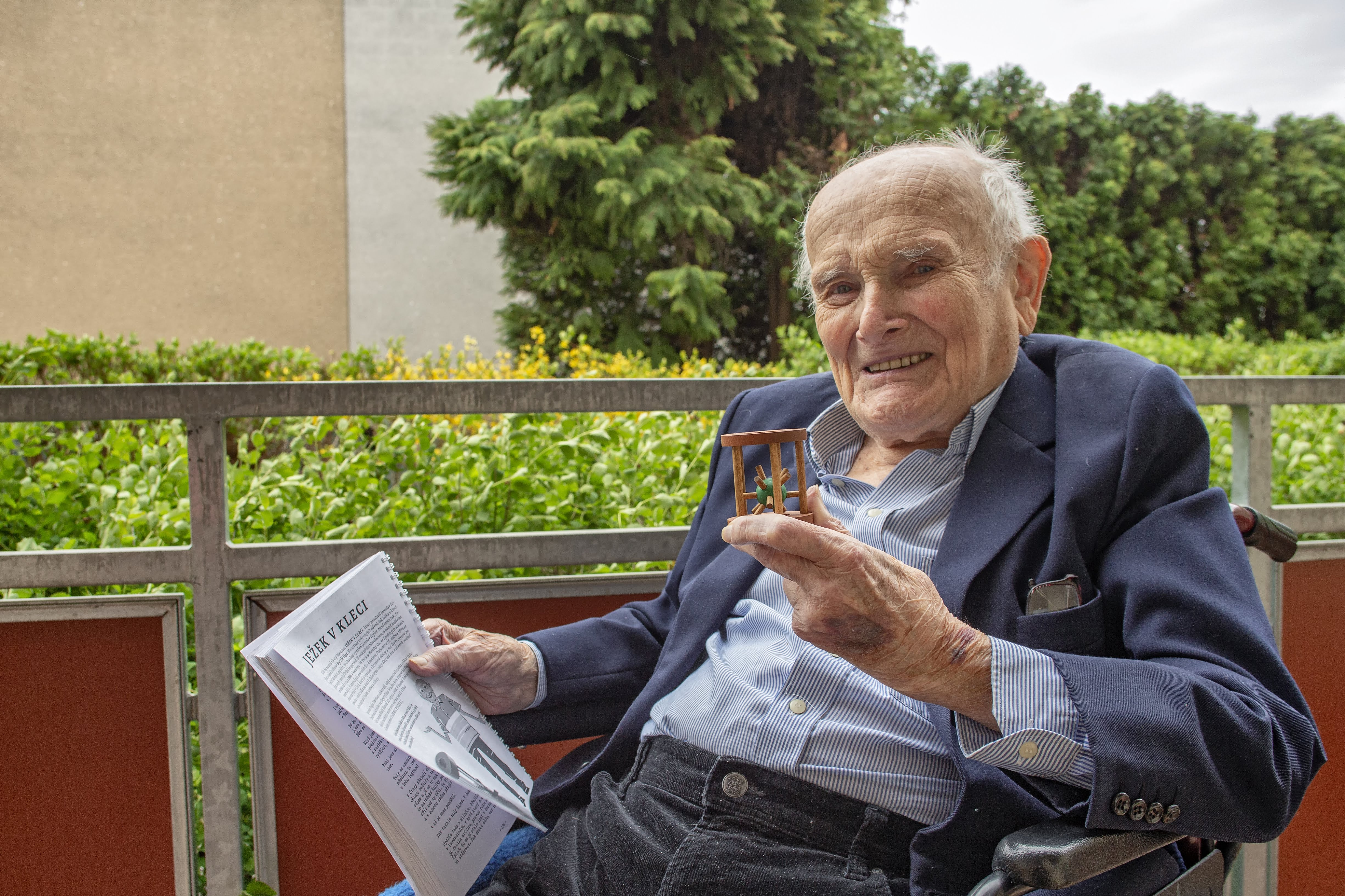 Jindra Hojer s ježkem v kleci a konceptem knihy Záhadné hlavolamy pro chytré hlavičky.